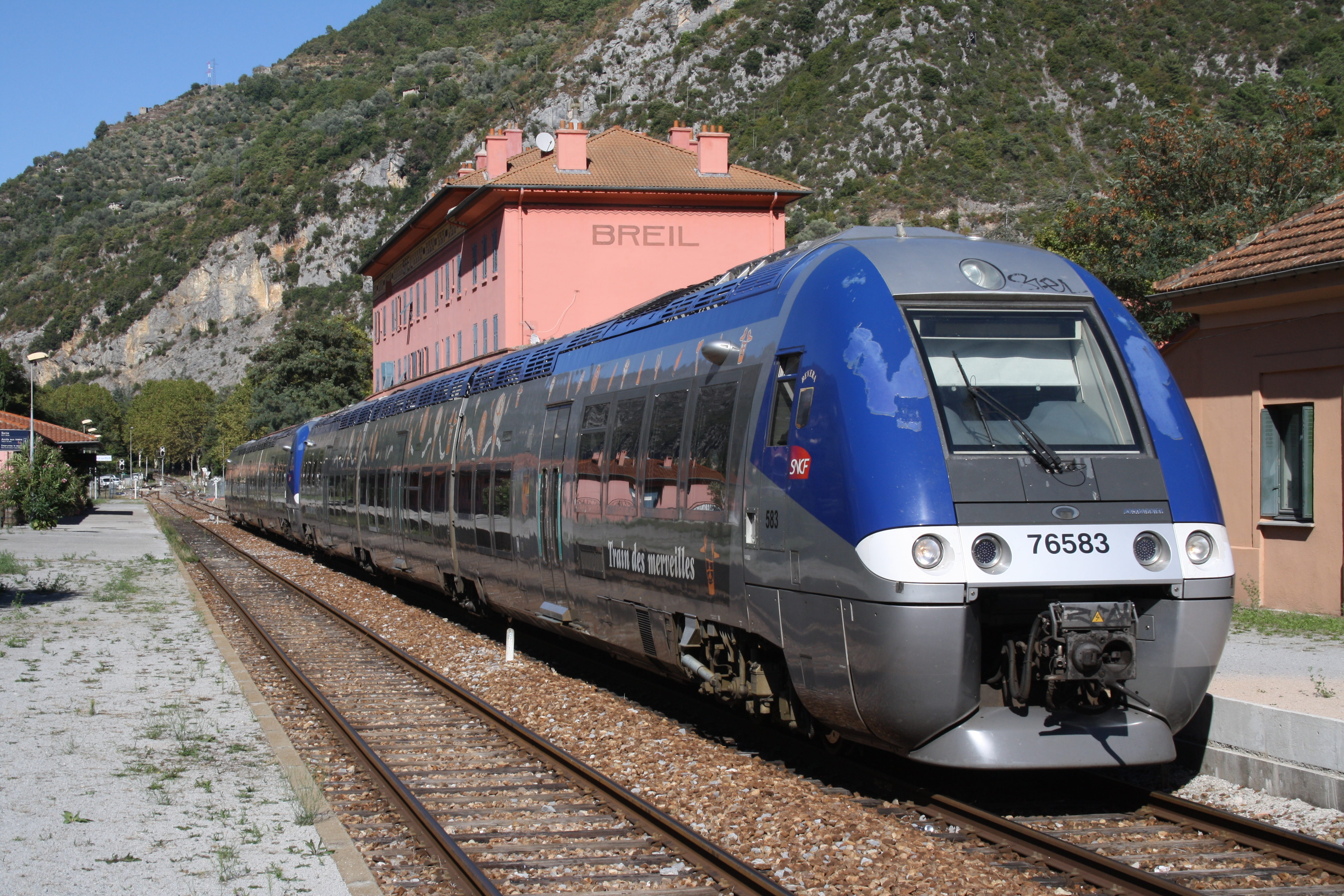 X 76500 en gare de Breil-sur-Roya